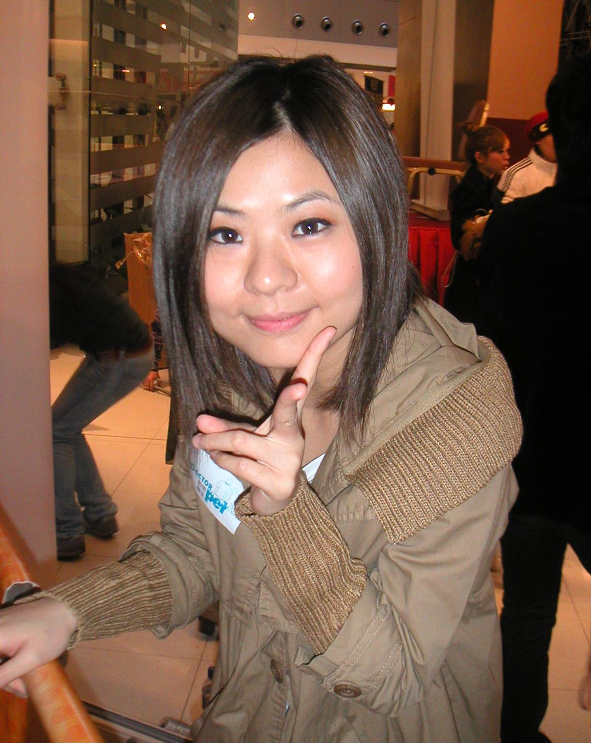 馮曦妤在九龍灣的國際展貿中心出席活動